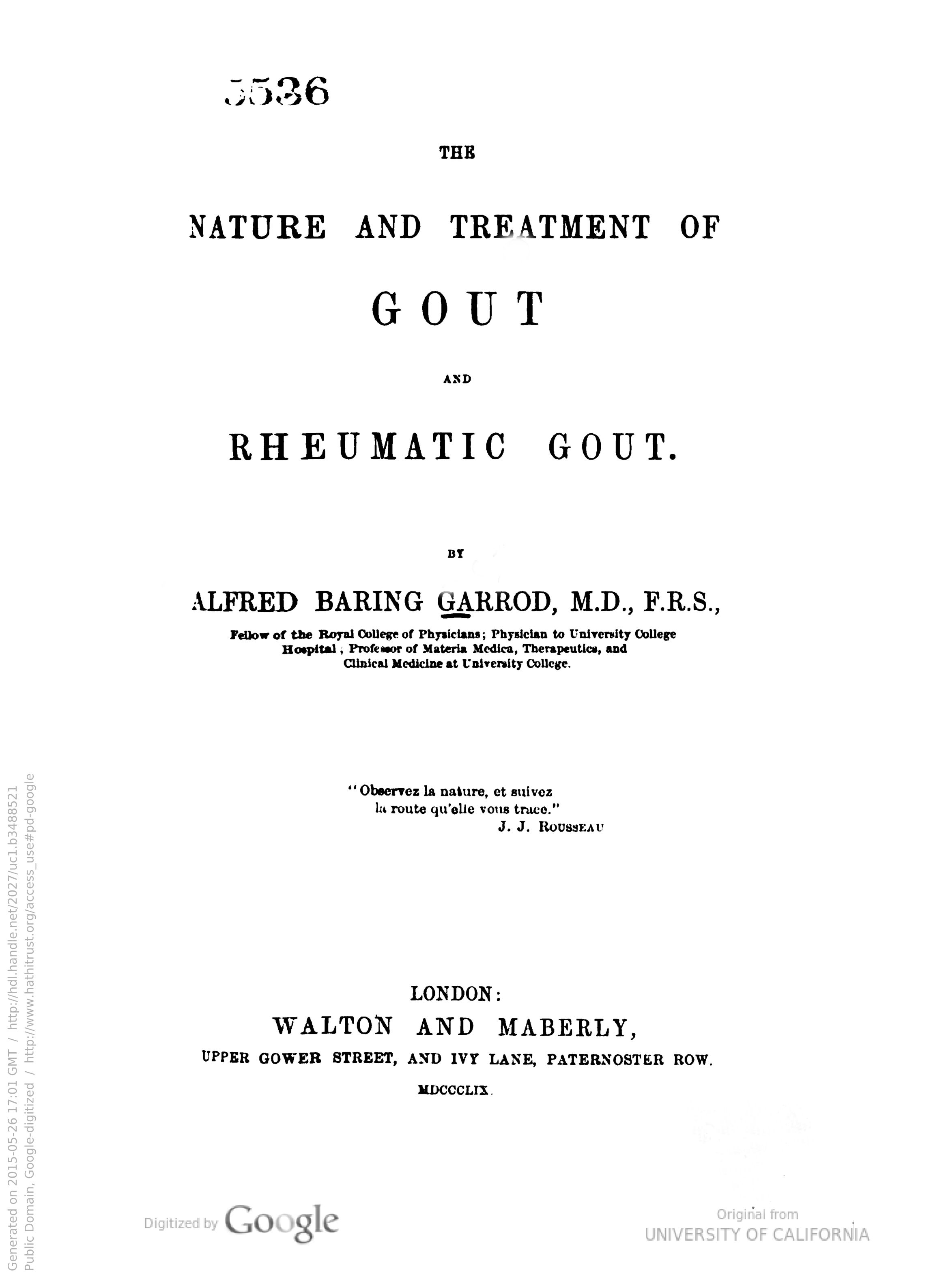 Το εξώφυλλο του βιβλίου του Άλφρεντ- Μπάριν Γκάροντ με τίτλο "Gout and Rheumatic Gout" που εκδόθηκε στο Λονδίνο το 1859